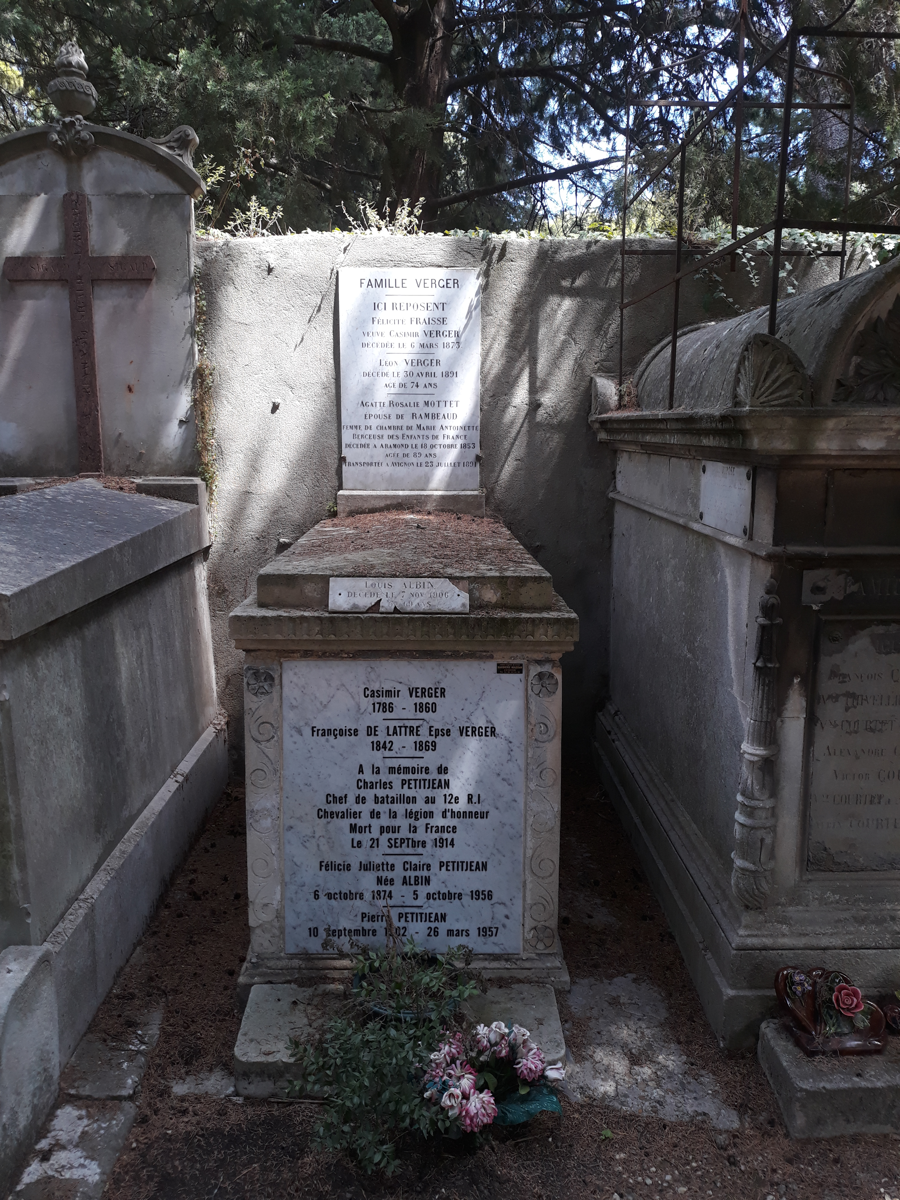 Das Grab der französischen Adeligen und Gouvernante Agathe de Rambaud auf dem Cimetière Saint-Véran in Avignon.